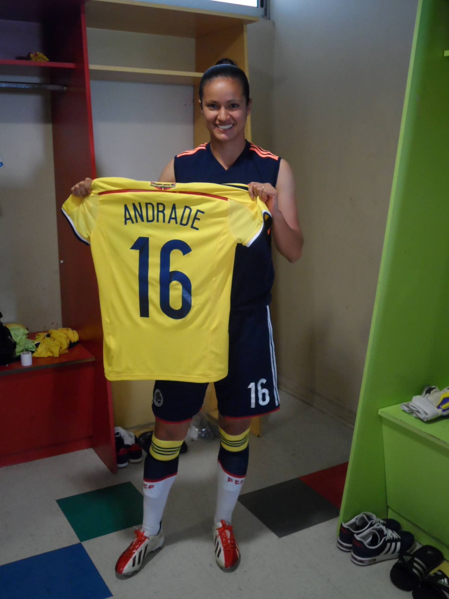 Futbolista Bogotana Lady Patricia Andrade Rodríguez delantera selección colombia femenina de fútbol, chuchú la princesa del balón en los juegos suramericanos 2014 odesur